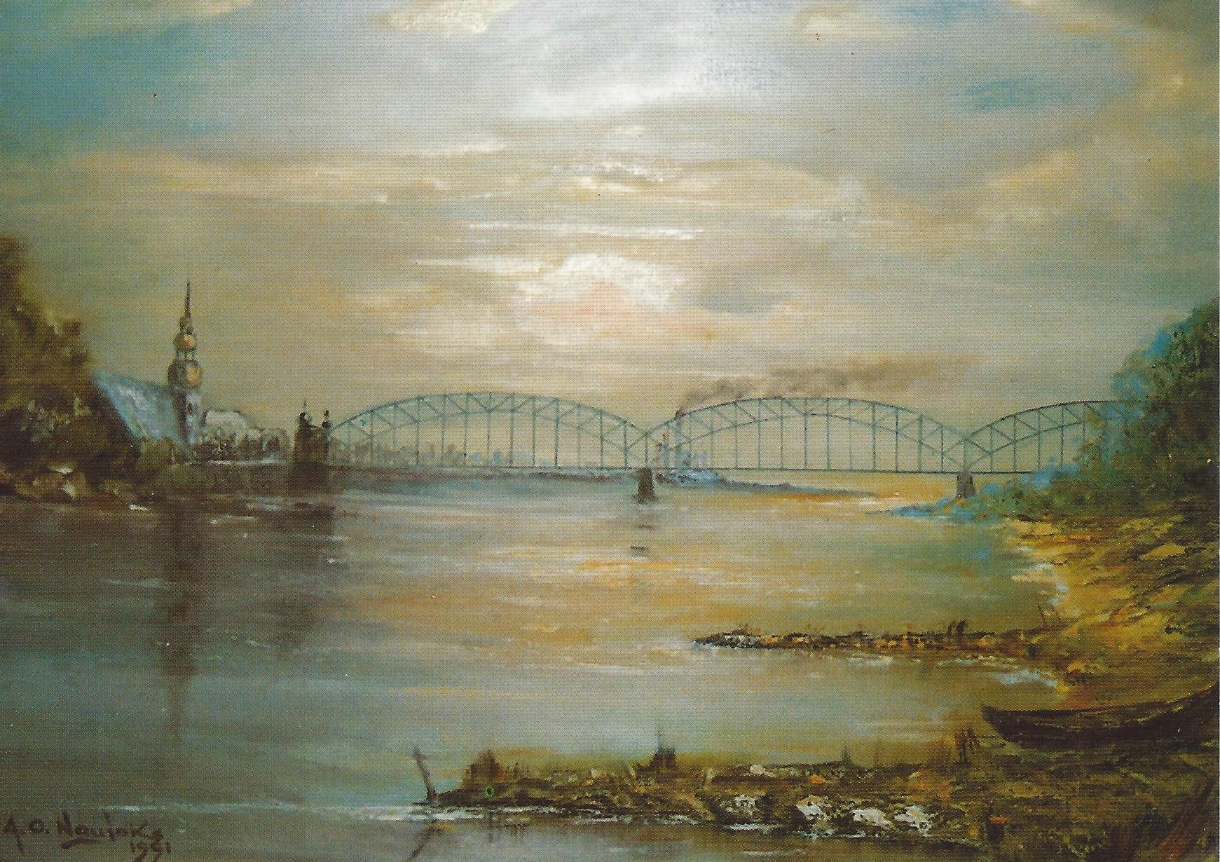 Postkarte mit Gemälde "Das alte Tilsit"